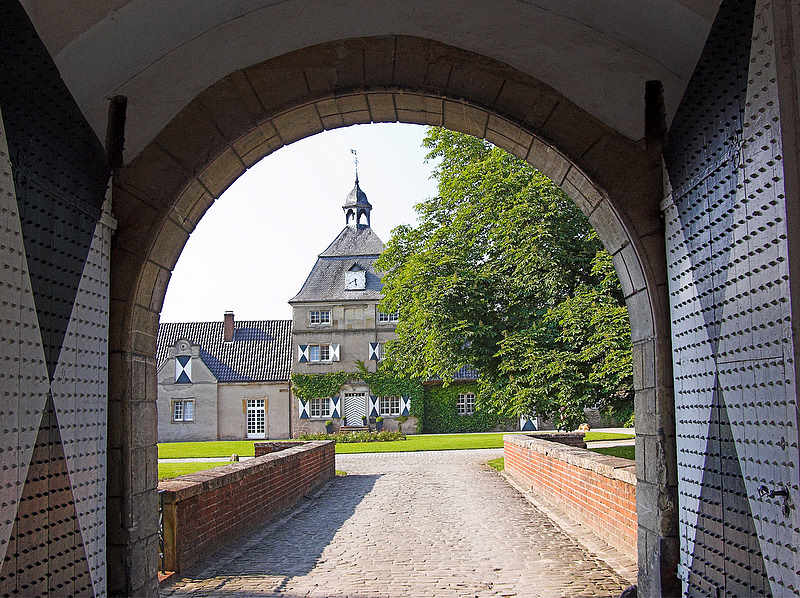 Blick auf die Turmuhr